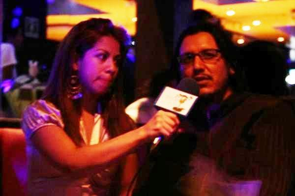 Miguel Arenas